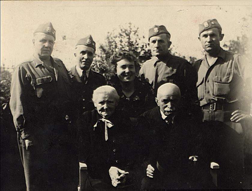 Wattenbek w pobliżu Bordesholmu - po uwolnieniu z oflagu 1945rok.